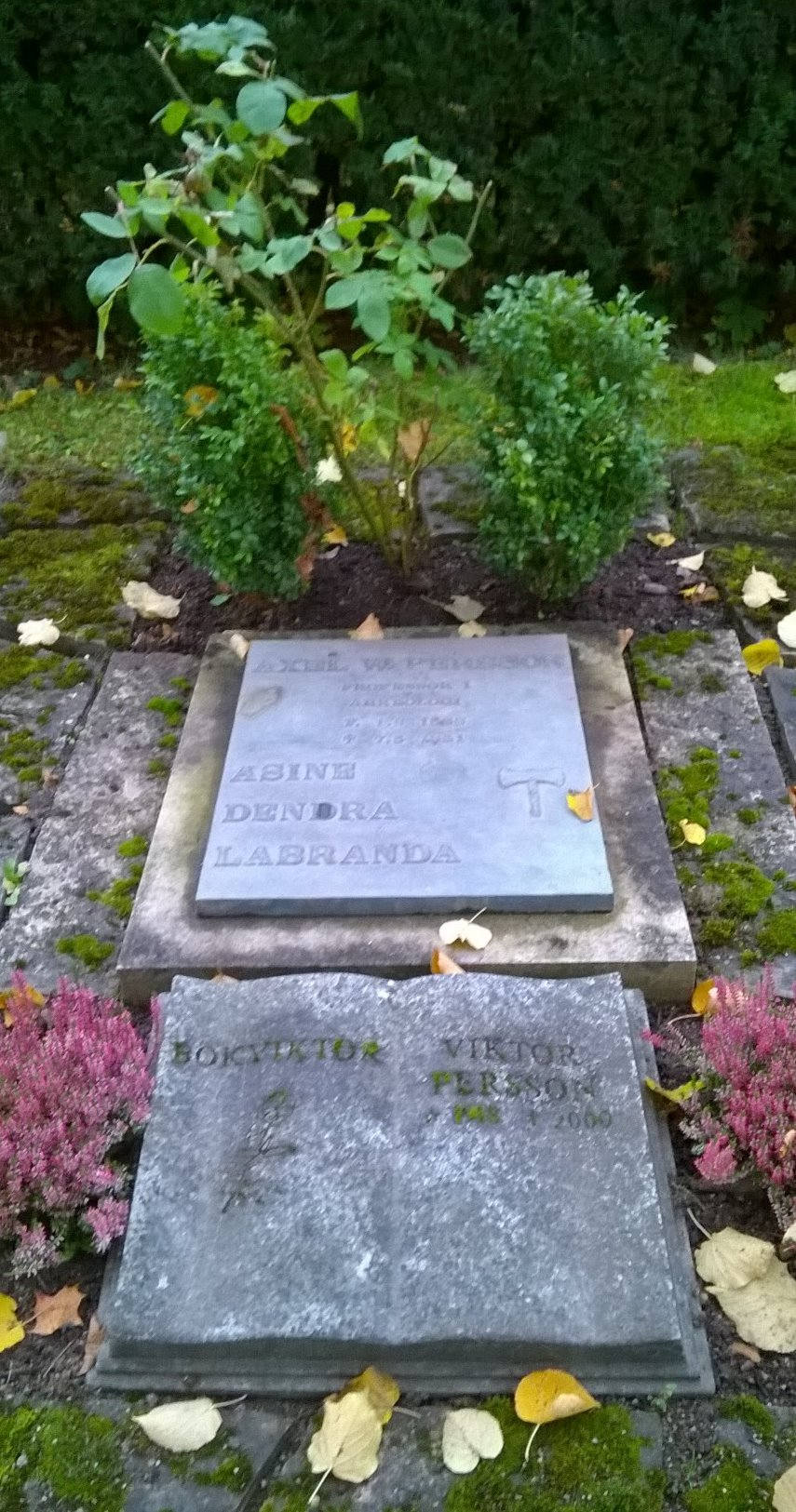 Viktor Perssons ("Bok-Viktor") gravsten på Uppsala gamla kyrkogård.